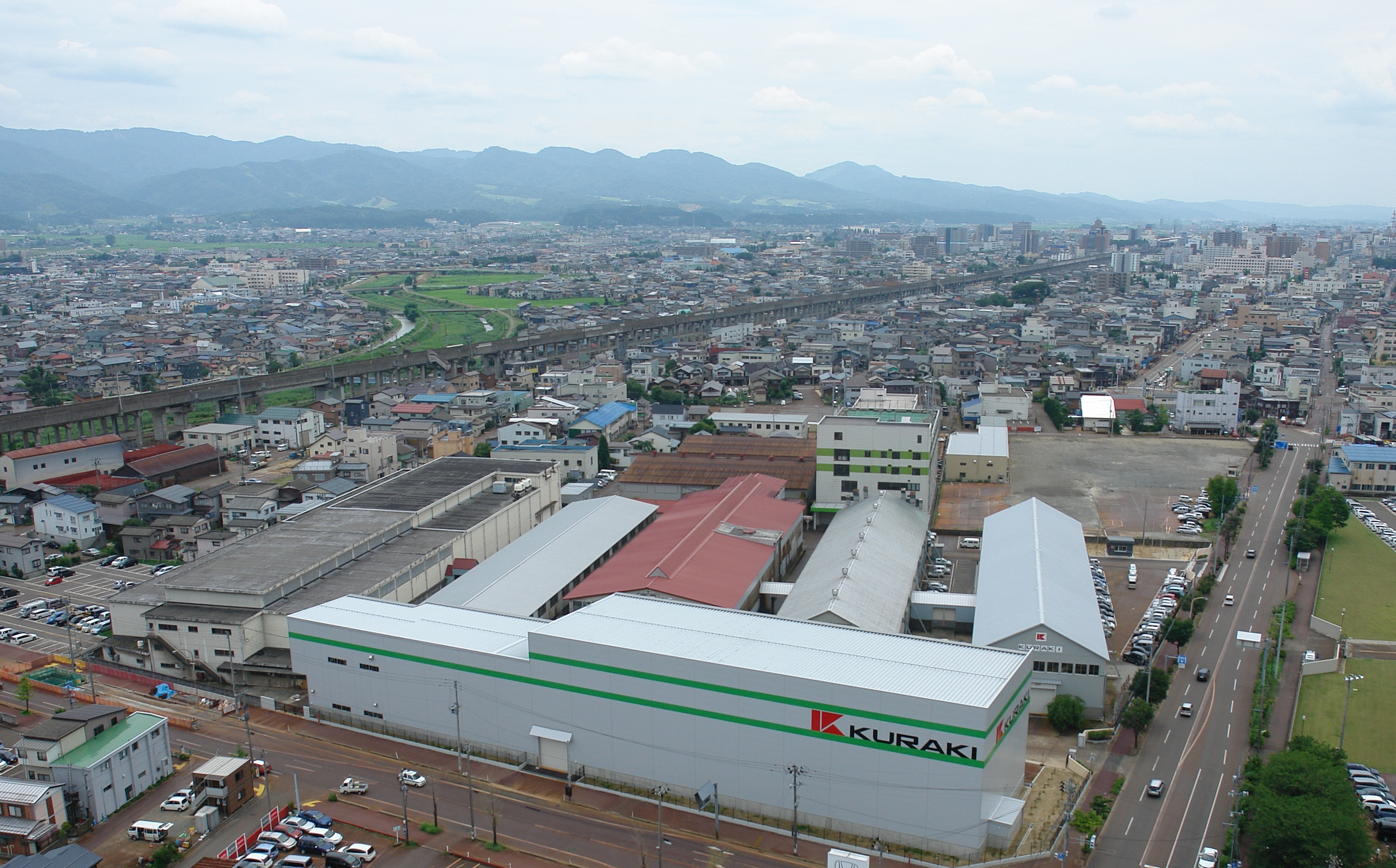 倉敷機械 社屋全景（新潟県長岡市）